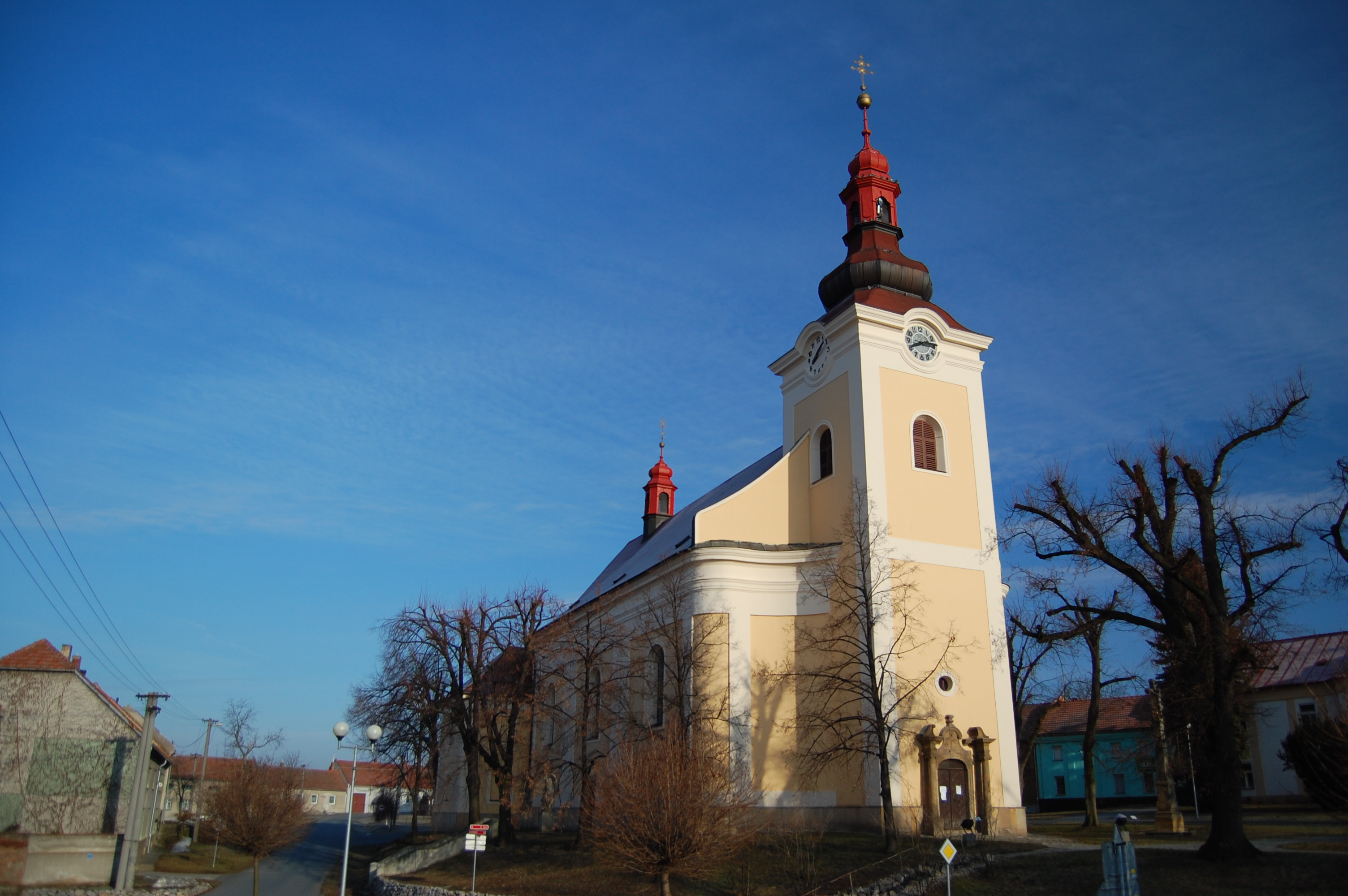 Kostel Nanebevzetí Panny Marie - boční pohled, Kralice na Hané, okres Prostějov